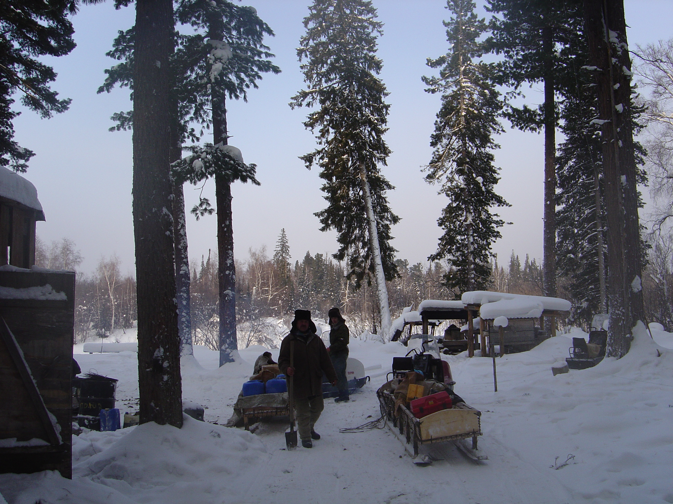 Кордон на р. Малый Юган, охранная зона Юганского заповедника